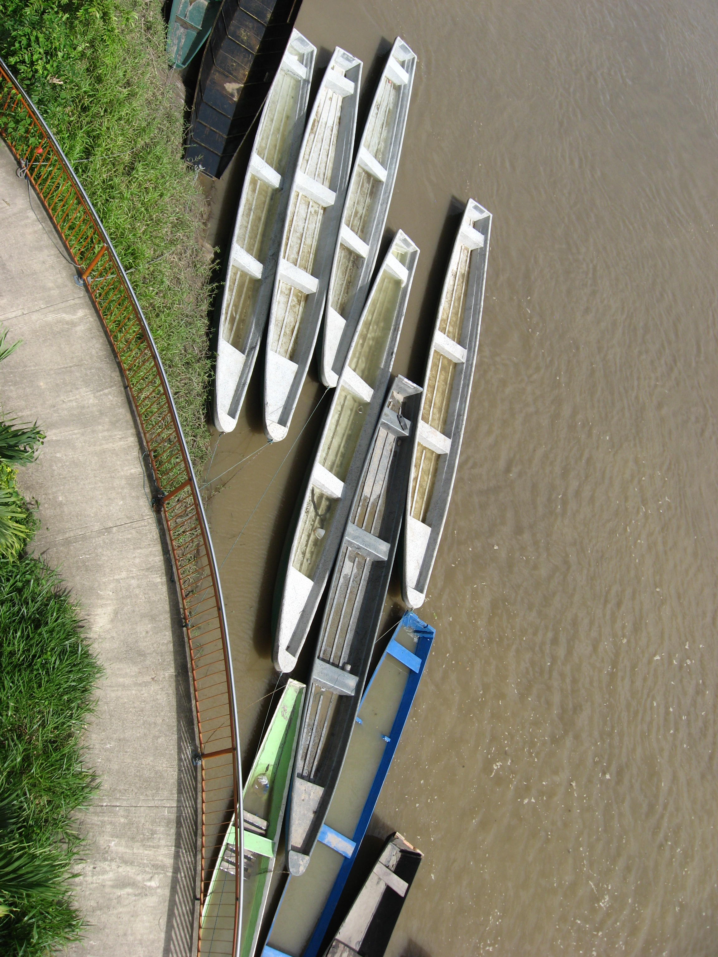 canoas ancladas a orillas del río Meta en el municipio de Cabuyaro. Esta fotografía fue tomada en el municipio colombiano con código 50124.